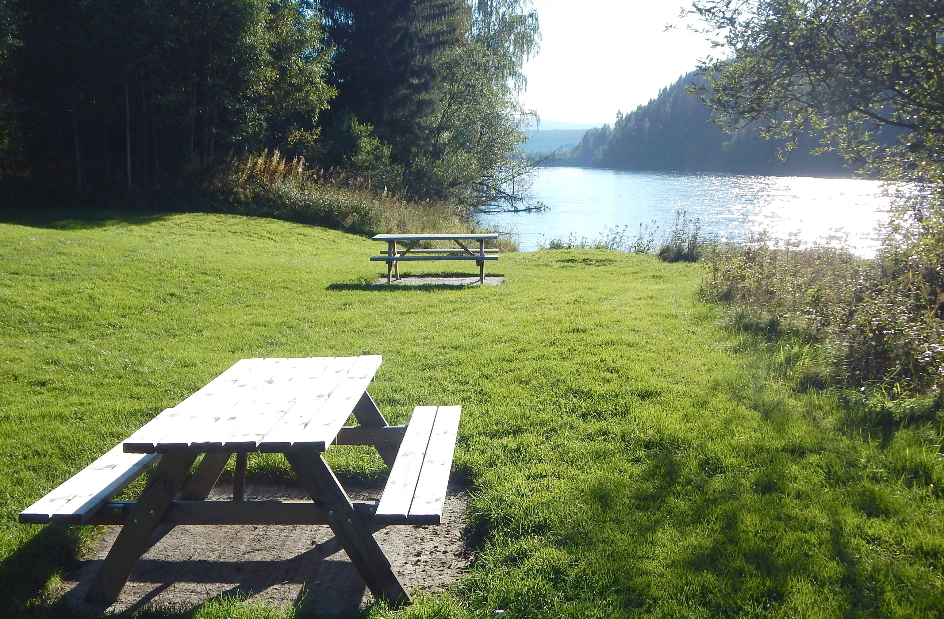 Elven Rena oppstrøms fra tettstedet Rena